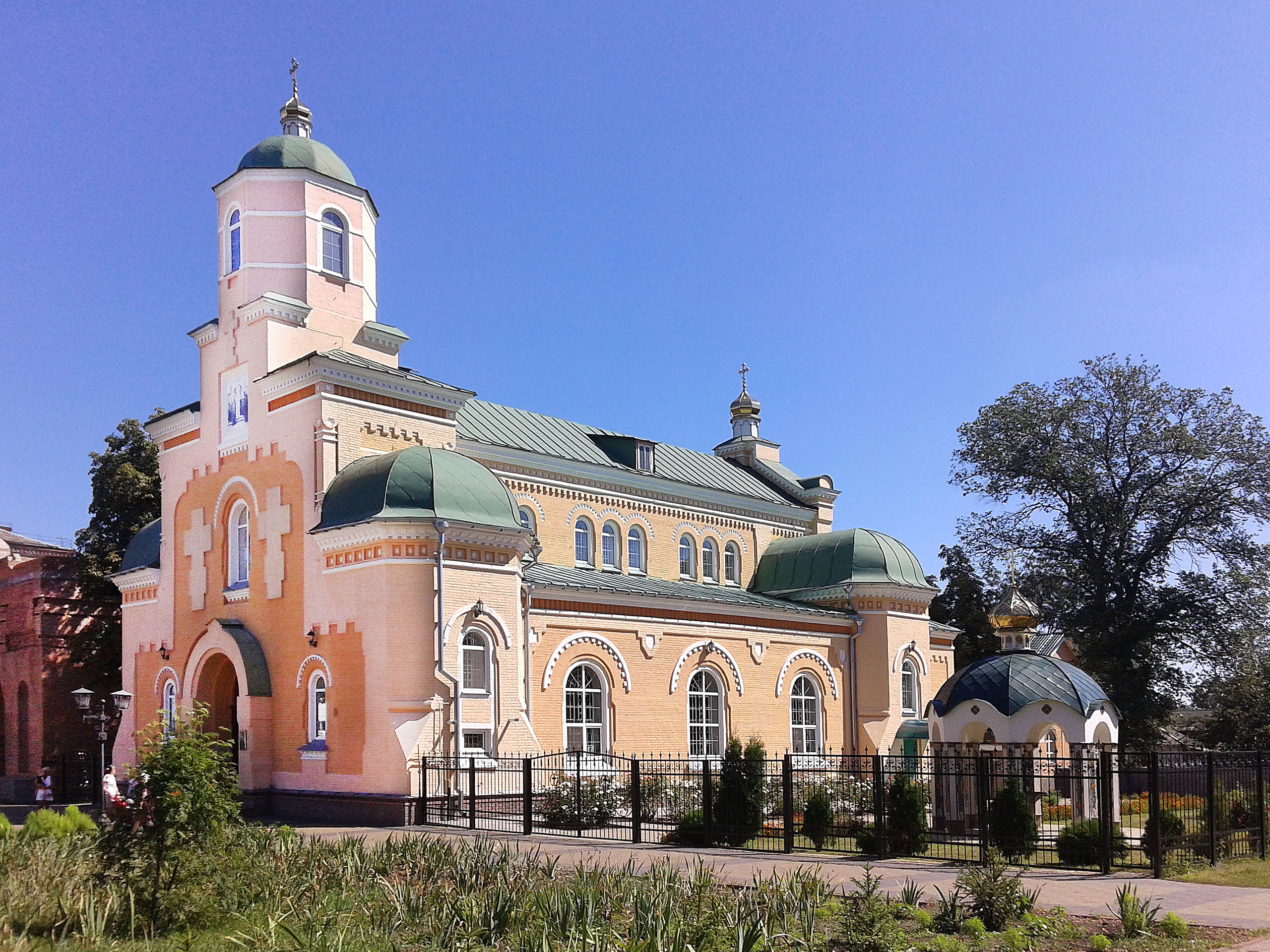 Стрітенська церква Прилуках